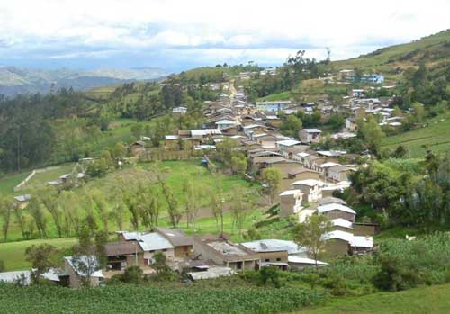 Pueblo de Querocoto en la provincia de CHota, departamento de Cajamarca, República del Perú